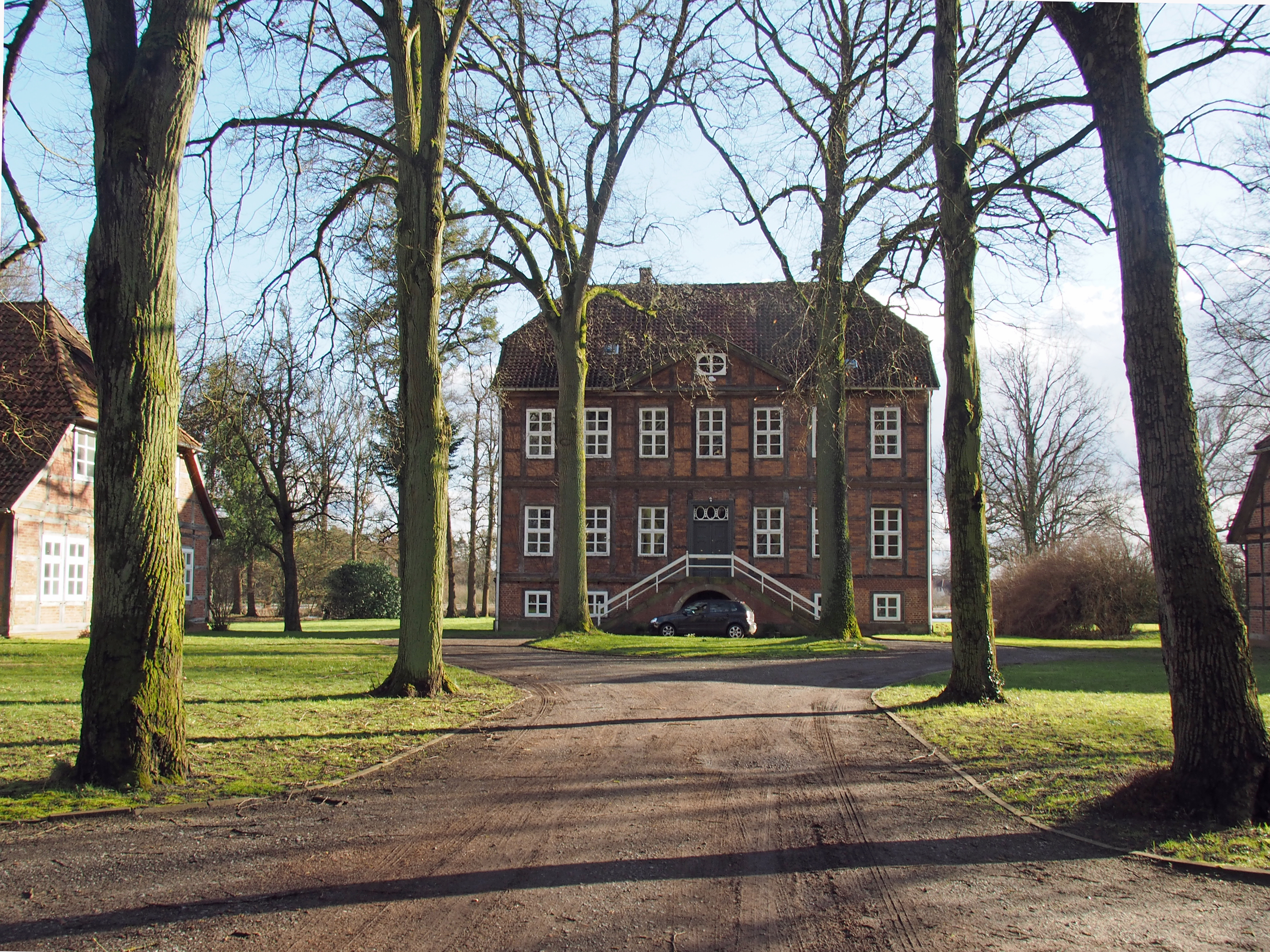 Denkmalgeschützter Gutshof "Rittergut I" in Eversen, Stadt Bergen (Niedersachsen)